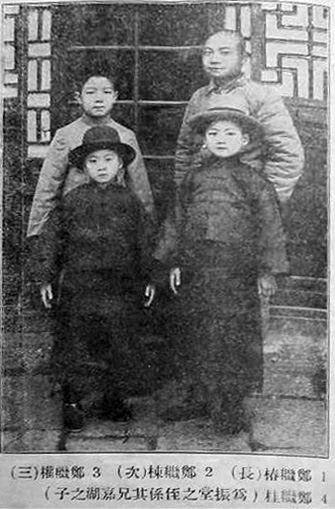 郑金声家的孩子